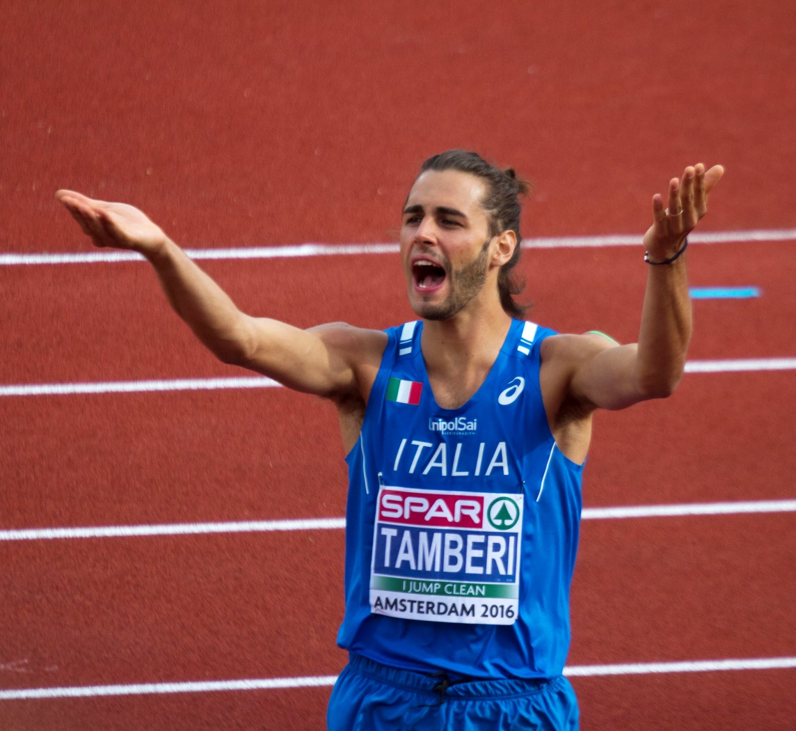 786 tamberi